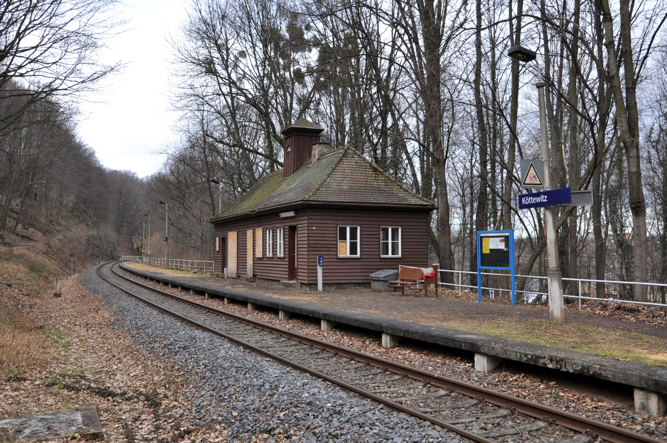 Haltepunkt Köttewitz, Müglitztalbahn